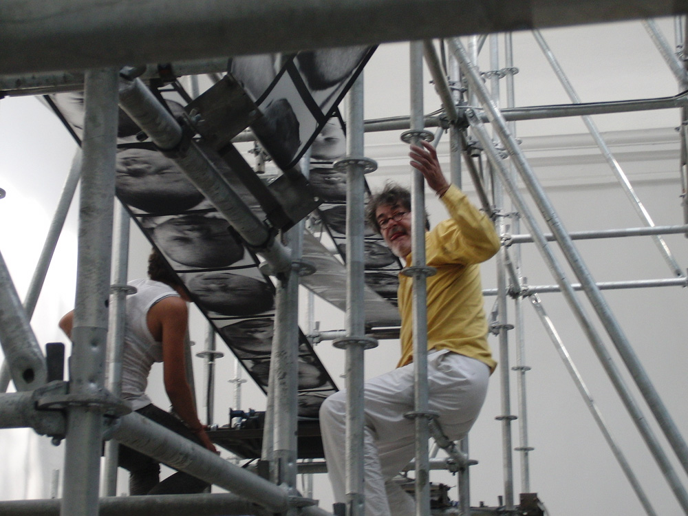 Ch.Boltanski in Raum 1 seiner Installation "Chance" 2011, Venedig